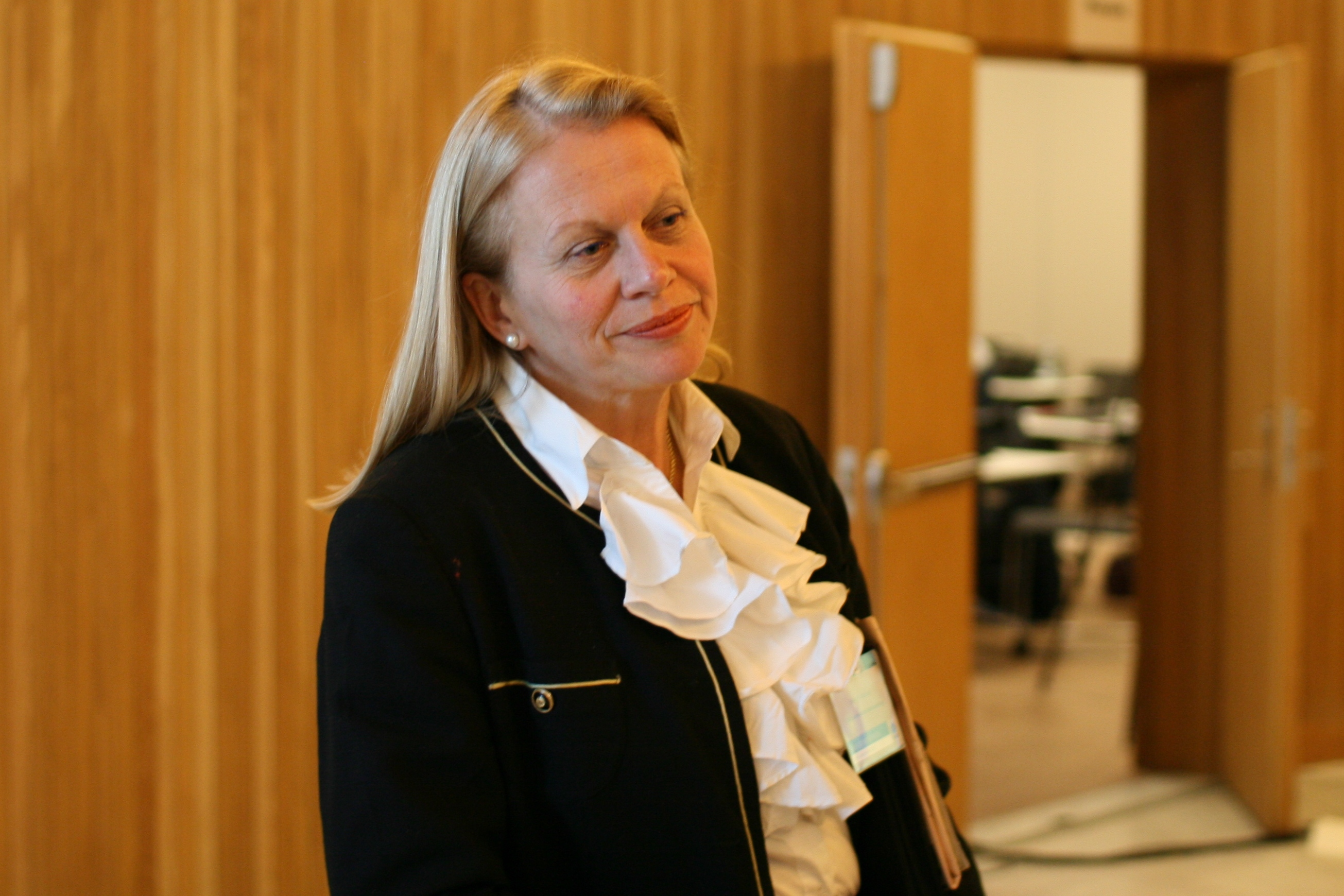 Janne Haaland Matlary, norsk statsviter og politiker (KrF). Fra NHOs Årskonferanse 2009.